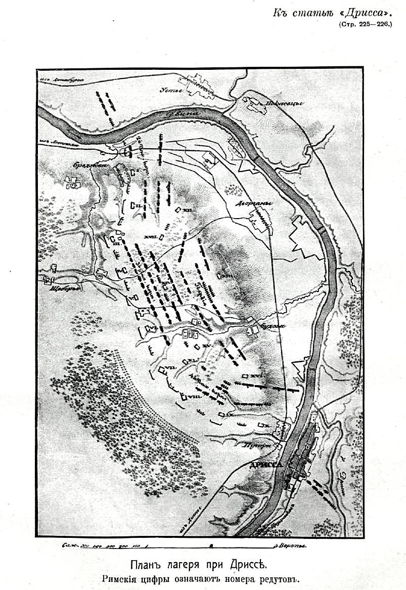 Это изображение было использовано для иллюстрирования статьи «Дрисса» опубликованной в девятом томе «Военной энциклопедии», который был издан книгоиздательским товариществом И. Д. Сытина в 1912 году в столице Российской империи городе Санкт-Петербурге.